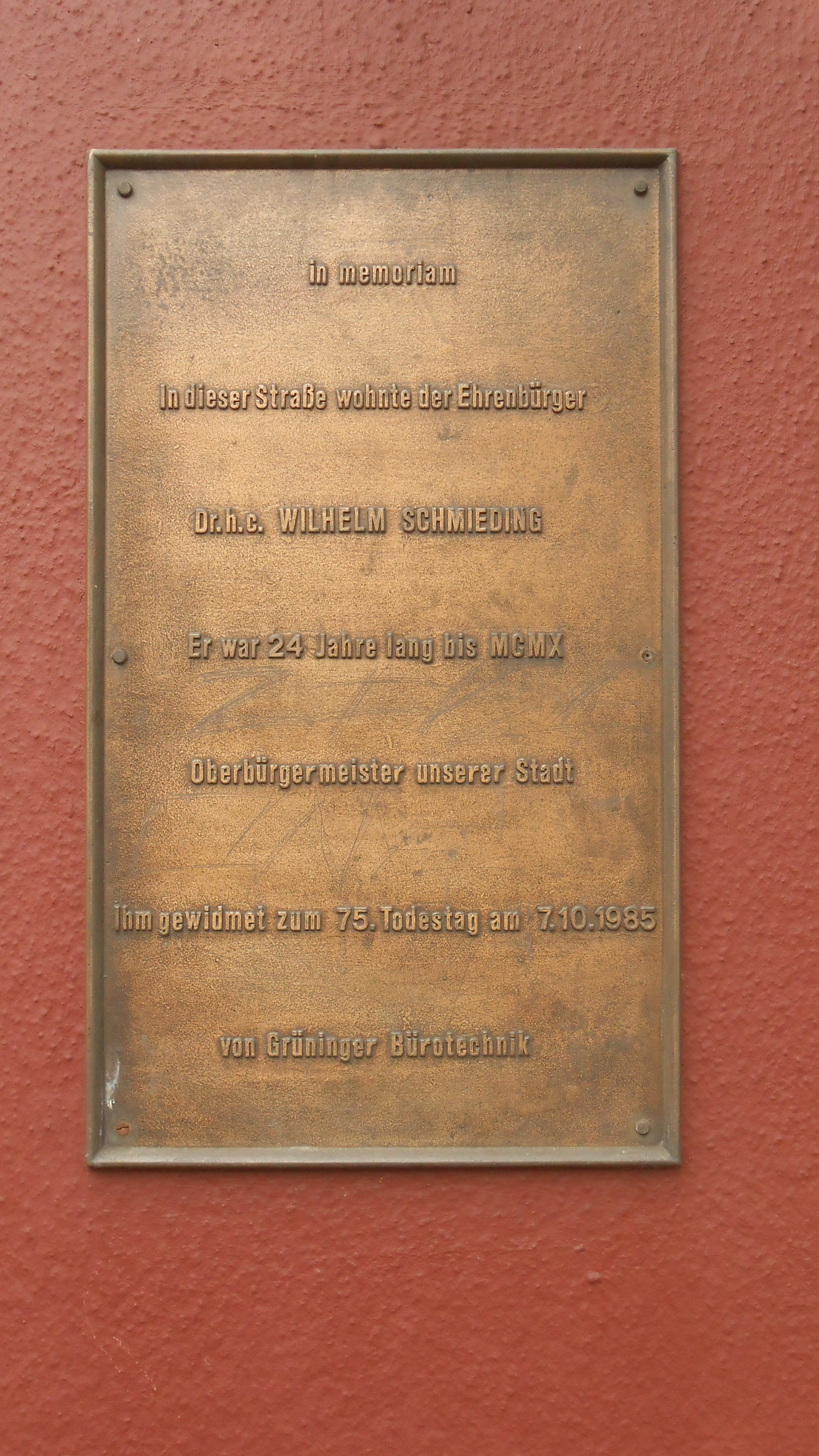 Erinnerungstafel an das Wohnhaus von Wilhelm Schmieding (Dortmunder OB von 1886 bis 1910), am heutigen Café Atlantico in der Weißenburger Straße.